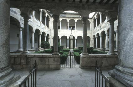 Catedral del Salvador, en Orihuela